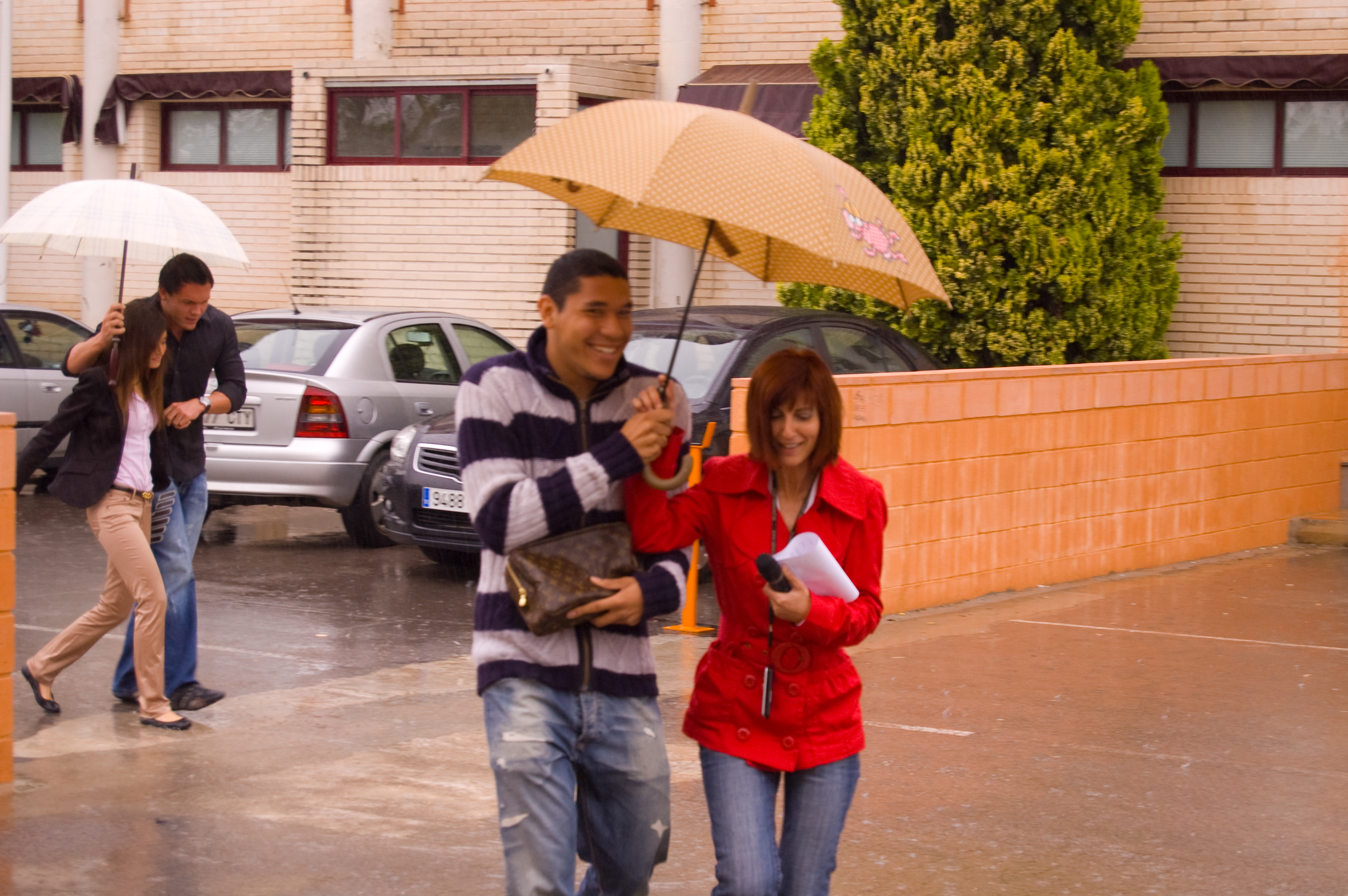 Hedwiges Maduro